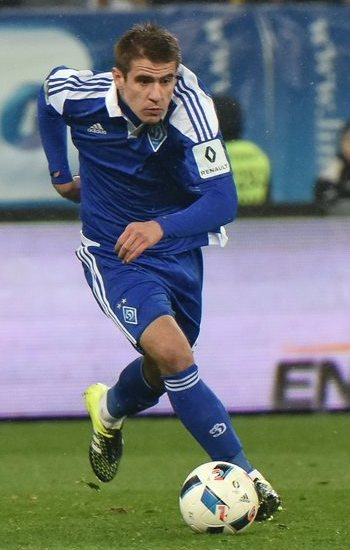 Артем Бєсєдін - футболіст Динамо (Київ)